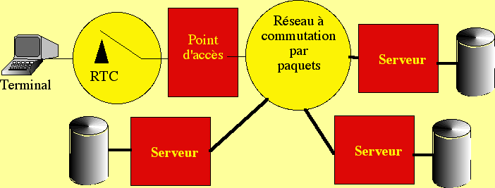 Schéma de l'architecture réseau d'un service vidéotex centralisé